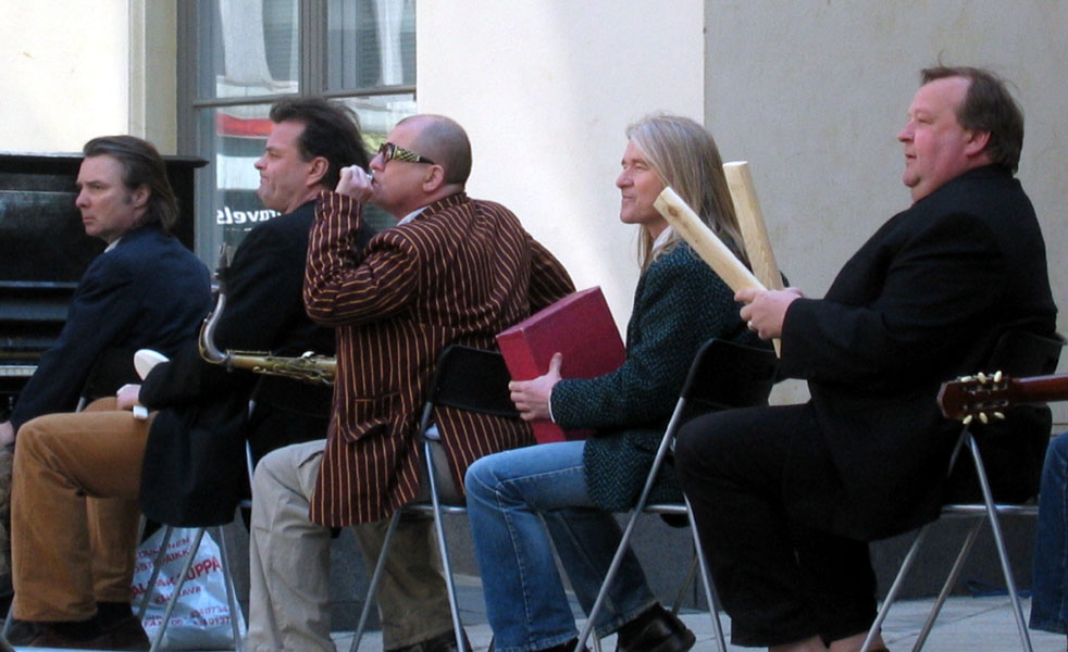 The Original Lapinlahden Linnut kuvaamassa materiaalia DVD-Videojulkaisua varten Helsingissä Perunatorilla Kaivopihan tuntumassa. Jäsenet kuvassa vasemmalta lukien: Pekka Hedkrok, Tapio Liinoja, Timo Eränkö, Matti Jaaranen ja Mikko Kivinen.